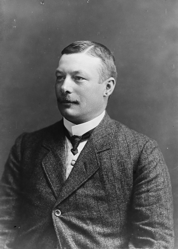 Godseier og stortingsmann Einar Borch (1870–1952).